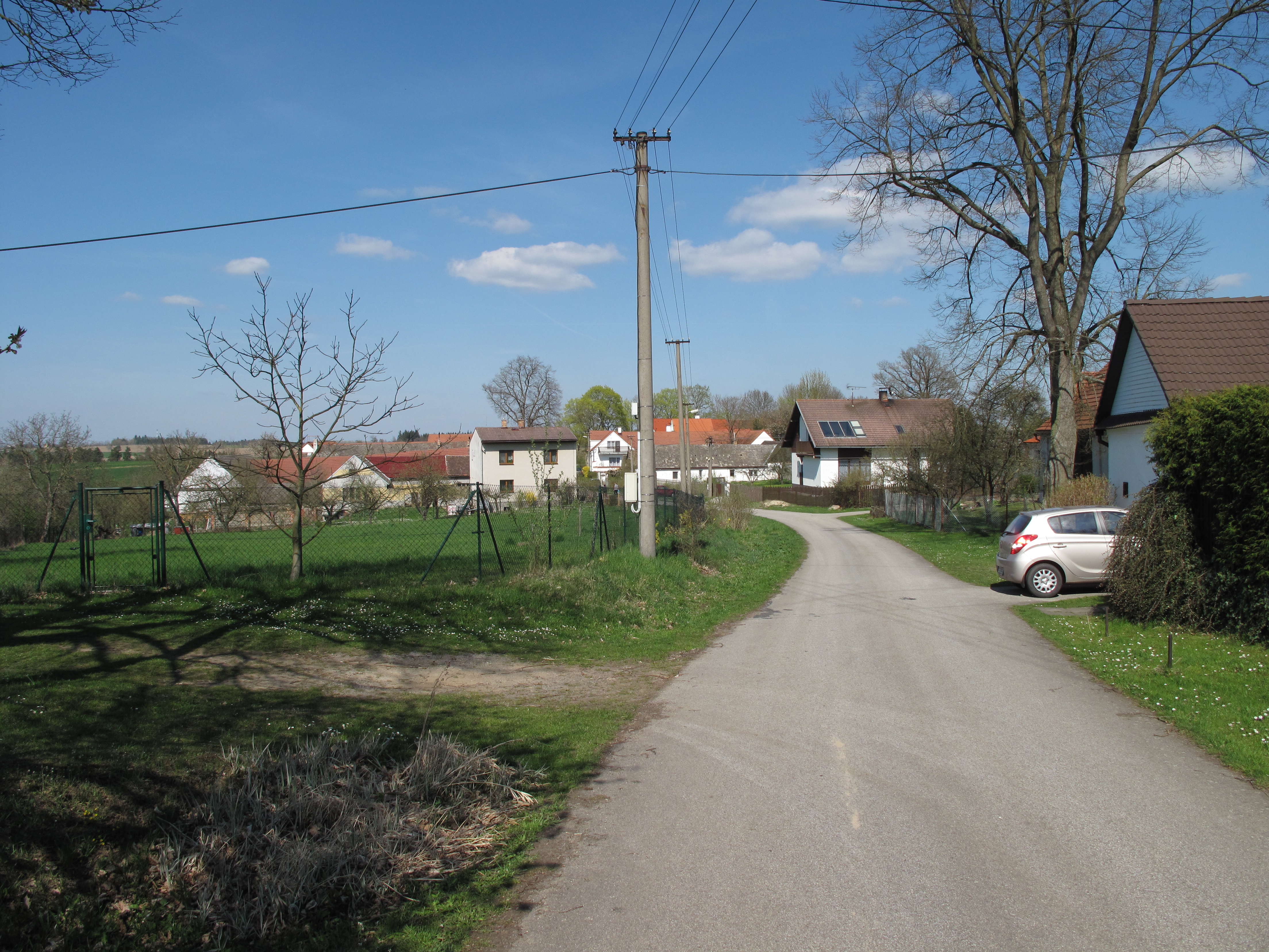 Cesta v Horních Kněžekladech. Okres České Budějovice, Česká republika.